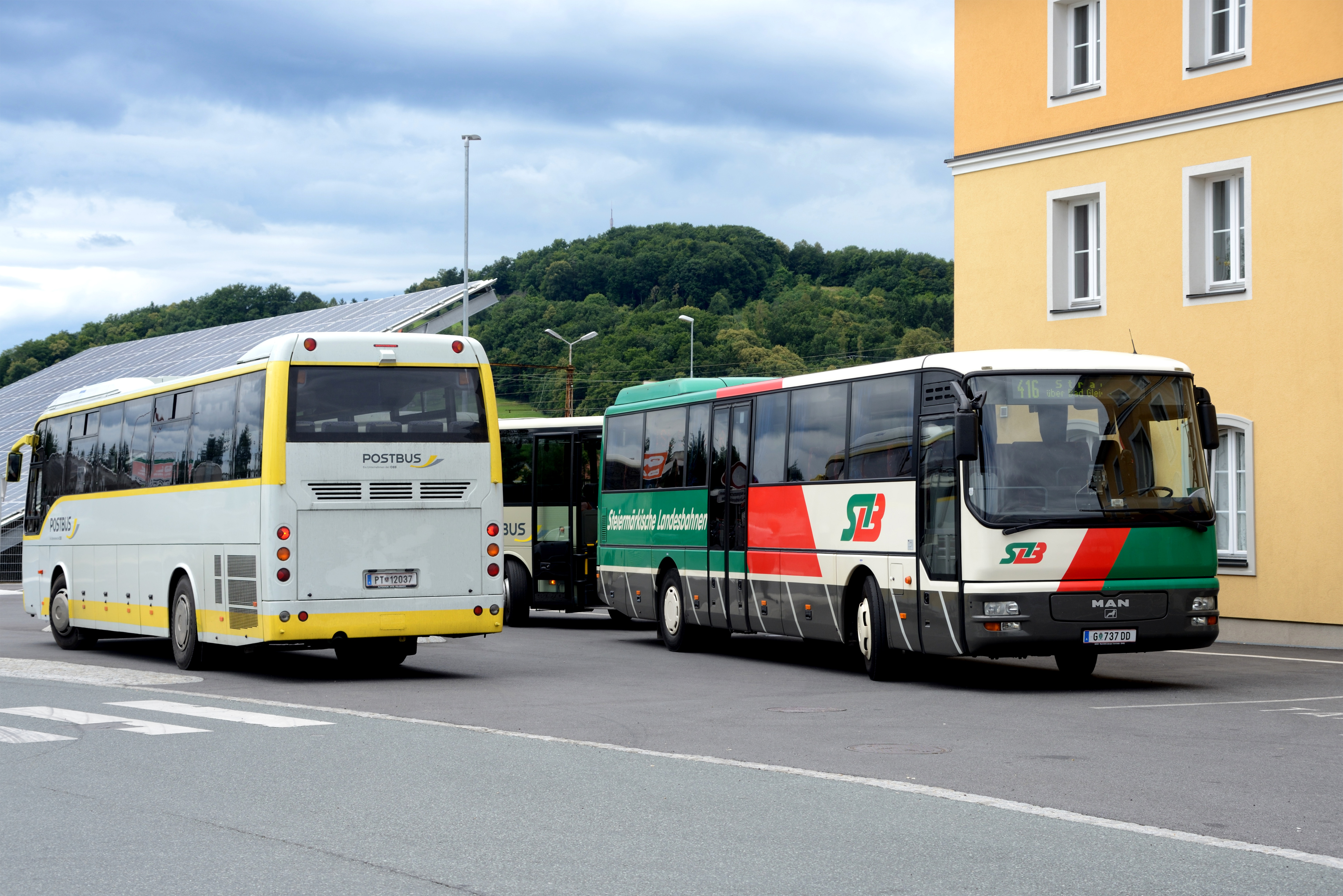 Ein MAN A01 der StLB und ein Temsa Safari von Postbus beim Feldbacher Bahnhof.